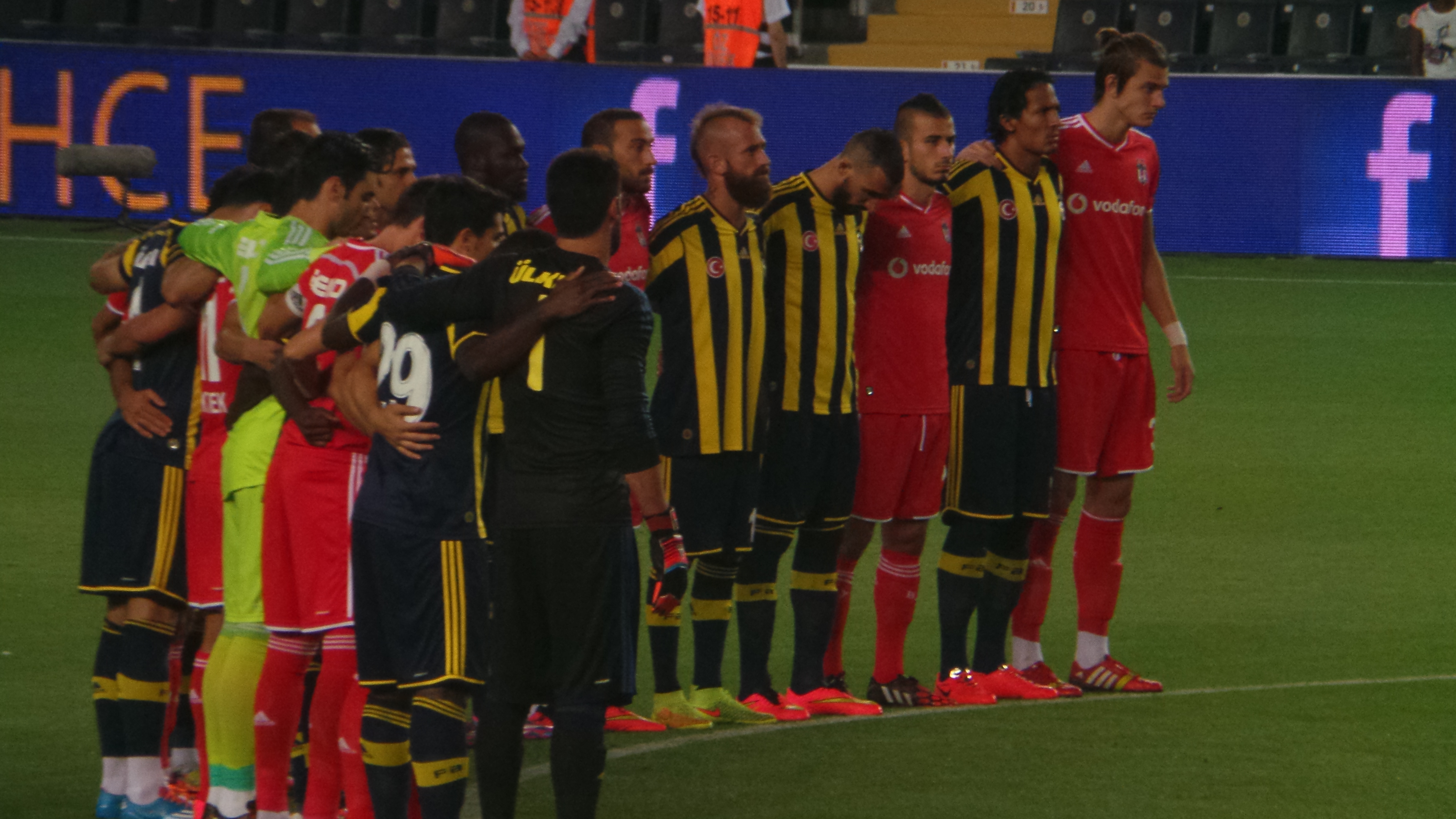 Fenerbahçe - BJK Soma maçı öncesi